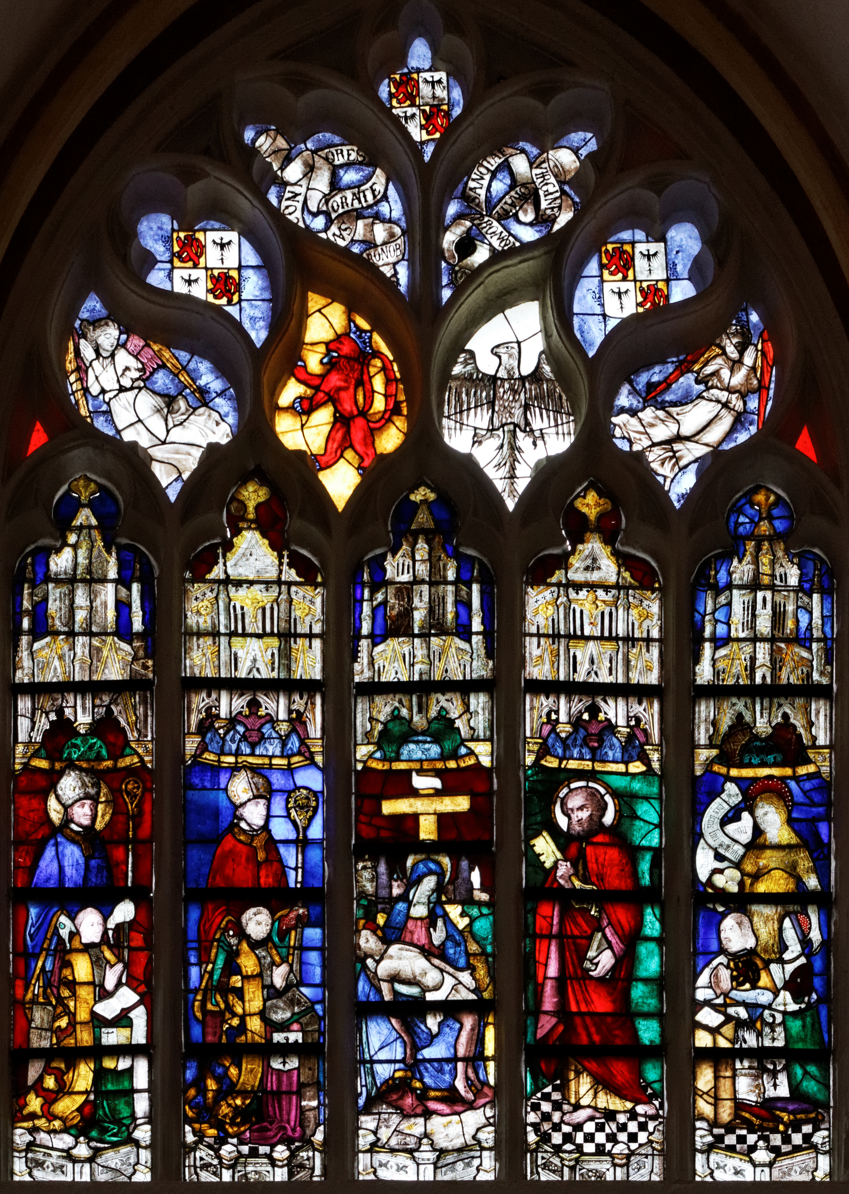 Baie 127 de la cathédrale Saint-Corentin à Quimper dans le Finistère. Verrière haute nord de la 4ème travée de la nef. Vitrail des Kerloaguen. ère lancette: Saint-Guillaume Pinchon présentant le chanoine Guillaume de Kerloaguen. 2ème lancette: Évêque présentant le chanoine Pierre de Kerloaguen. 3ème lancette: Vierge de Pitié. 4ème lancette: Saint-Pierre. 5ème lancette: Maurice de Kerloaguen et Louise de Bréhet, dame de Rosampoul, son épouse, présentés par Sainte-Marie l'Égyptienne. Tympan Lion des Bréhet et Aigle des Kerloaguen. Anges. Phylactères: Sancti confessores orate pro nobis & Sanctae virgines orate pro nobis. Armes: écartelé, au 1 et au 4, d'or au lion de gueules, armé, lampassé et couronné d'azur, au 2 et au 3, d'argent à l'aigle éployée de sable, membrée et becquée de gueules. Fin XVème.